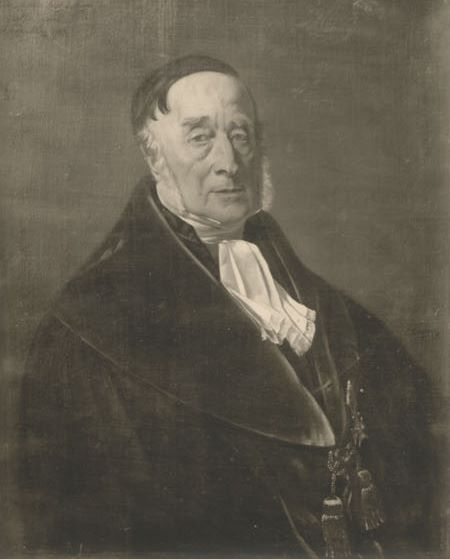 Samuel Marum Mayer (1797 - 1862), deutscher Jurist, Professor in Tübingen; Ölgemälde, Tübinger Professorengalerie, Inventar: 97/165